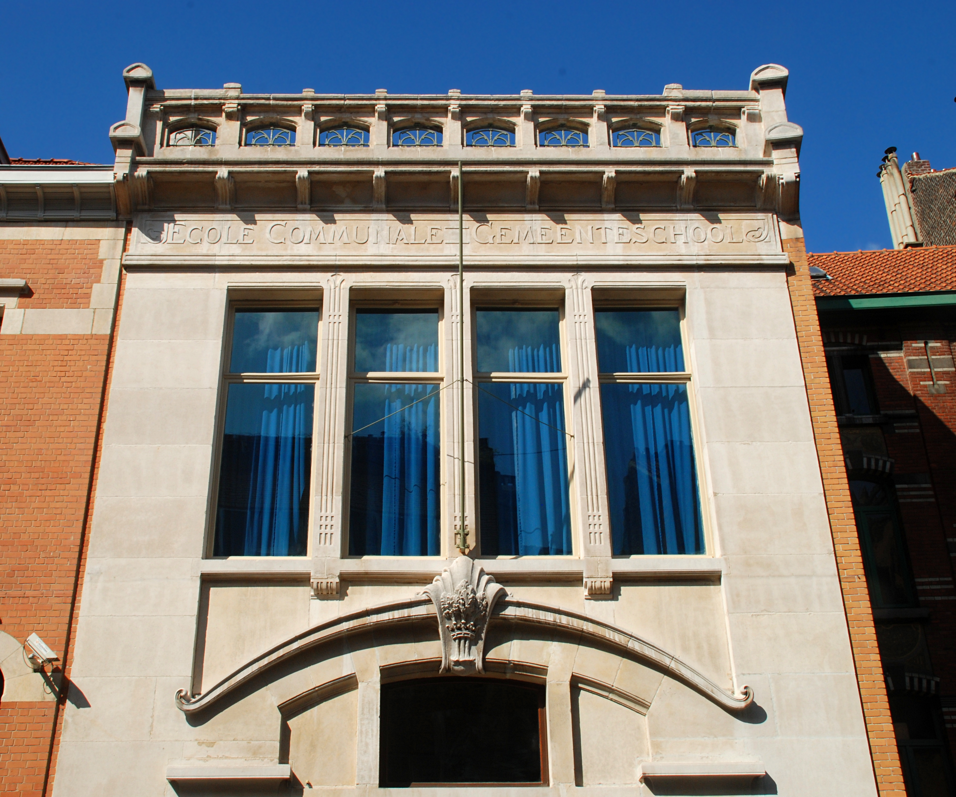 Belgique - Bruxelles - École Rodenbach (Art nouveau - architecte Henri Jacobs - 1905-1911)